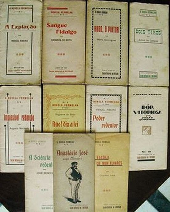 A NOVELA VERMELHA (Colecção): I Série, nº 1 ao nº X; II Série, nº 1 (Maio de 1922) ao nº II (Julho 1922); Editor: Secção Editorial d’A Batalha, Calçado do Combro, 38º-A, 2º, Lisboa, 1921-22, 12 numrs